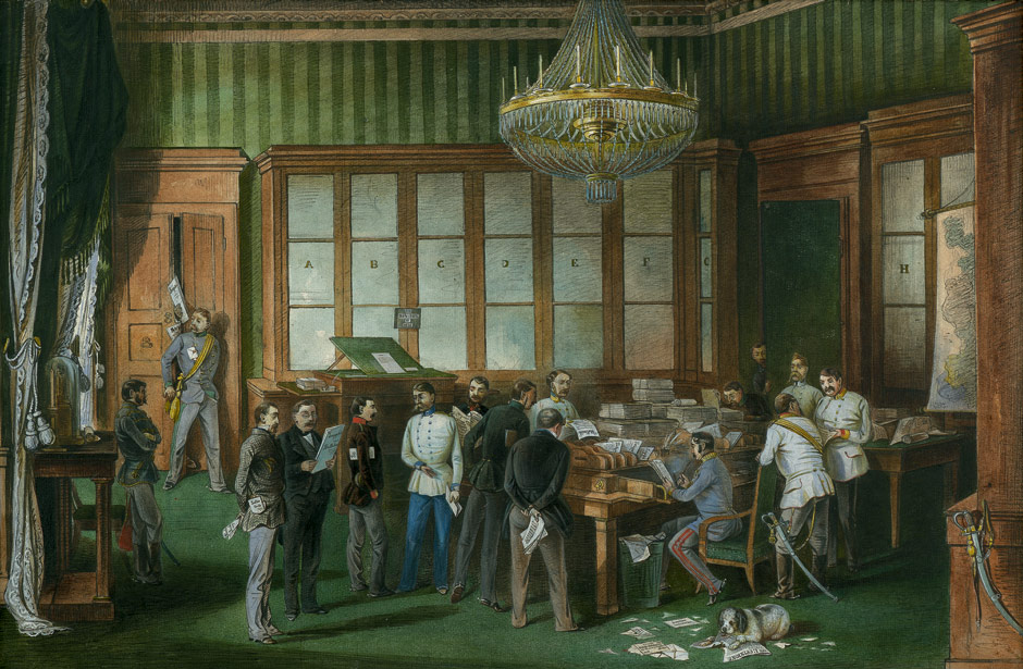 Karl Borromäus Philipp Fürst zu Schwarzenberg (1802–1858)